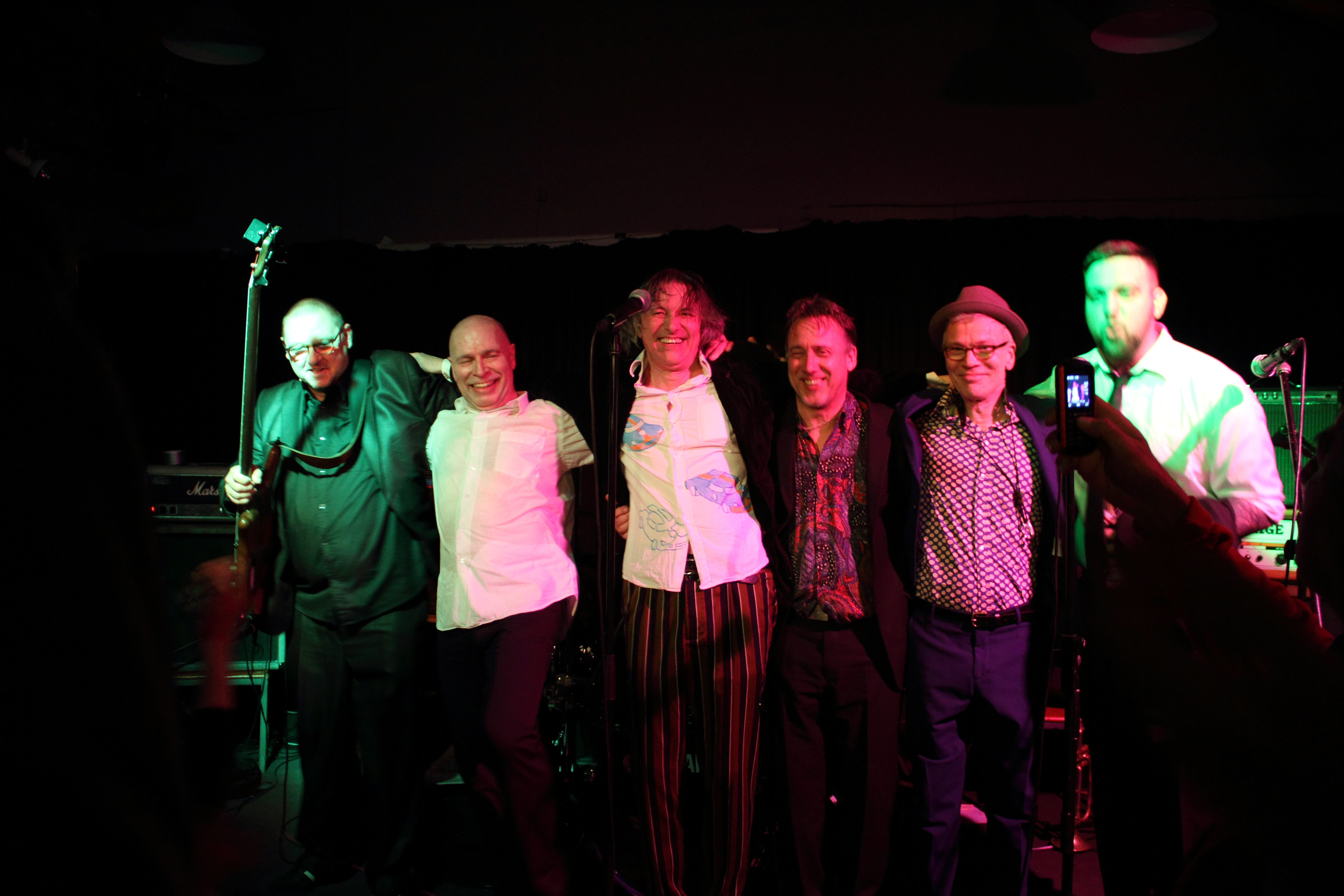 Die Soul-Punk-Band Family 5 um Peter Hein und Xao Seffcheque beim Auftritt im Club W71, Weikersheim.